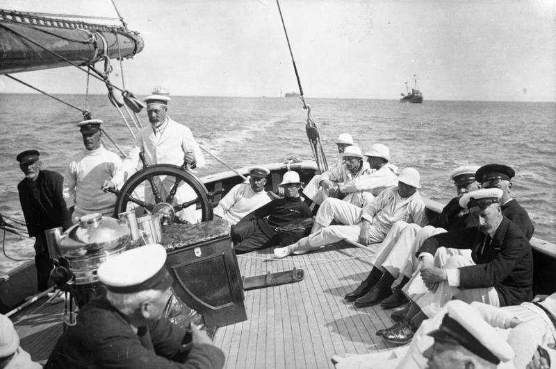 Englands König steuert selbst ein Schiff ! Der König von England am Steuer seiner Yacht "Britannia" bei der Cowes - Regatta.